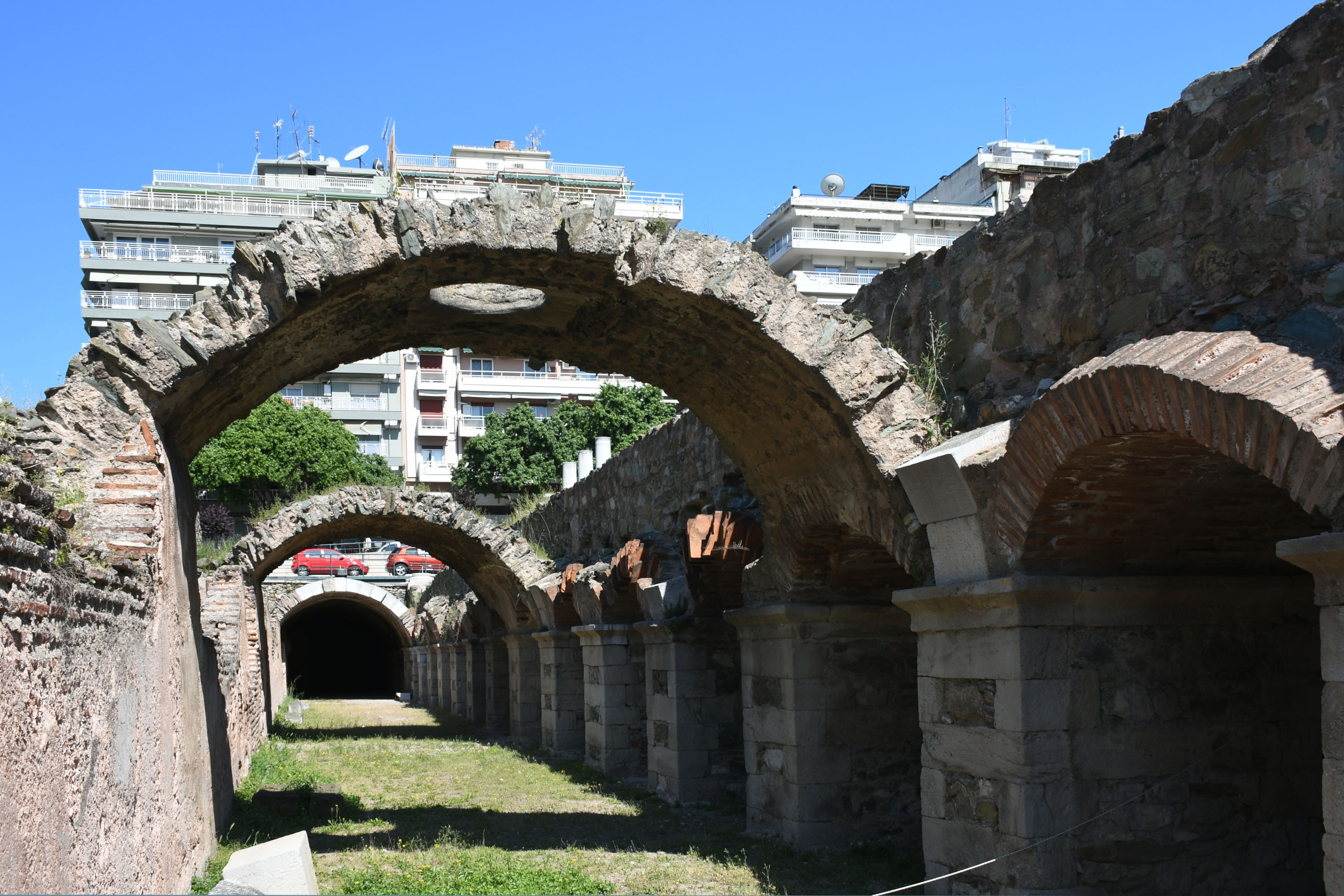 Thessaloniki, Antike Agora - Forum Romanum